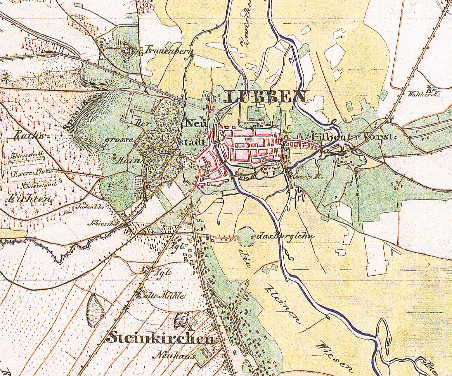 Lübbenn (Spreewald), Landkreis Dahme-Spreewald, Brandenburg, Ausschnitt aus dem Urmesstischblatt 4049 Lübben (Spreewald) Altlandsberg von 1846